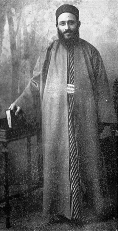 הרב חנניה גבריאל בצעירותו